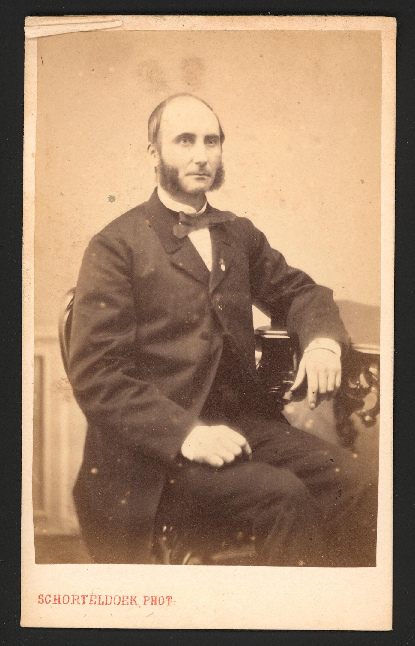 portret van de Nijmeegse burgemeester Pieter Claude Bijleveld